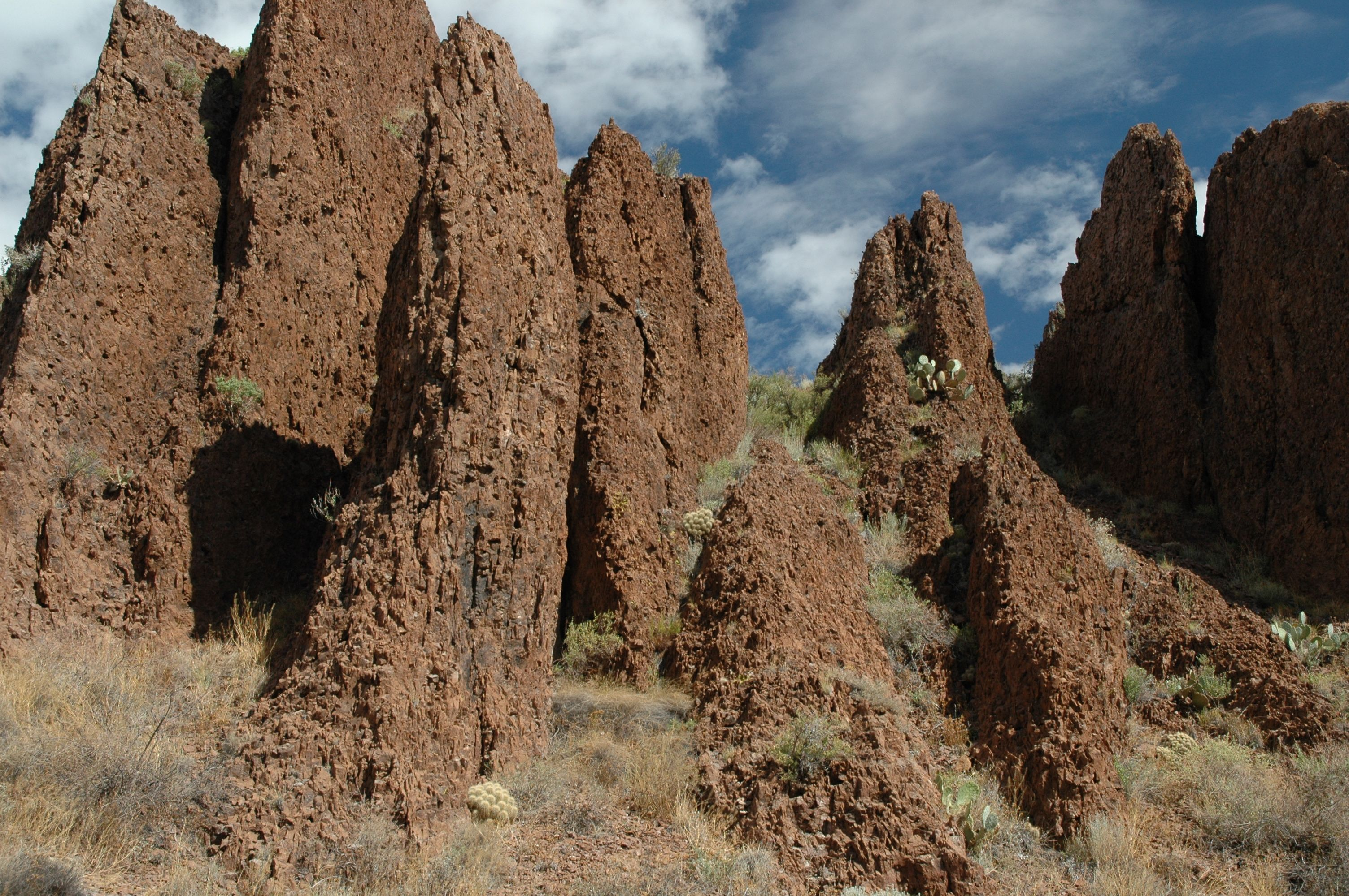 Photo: John Bertrand